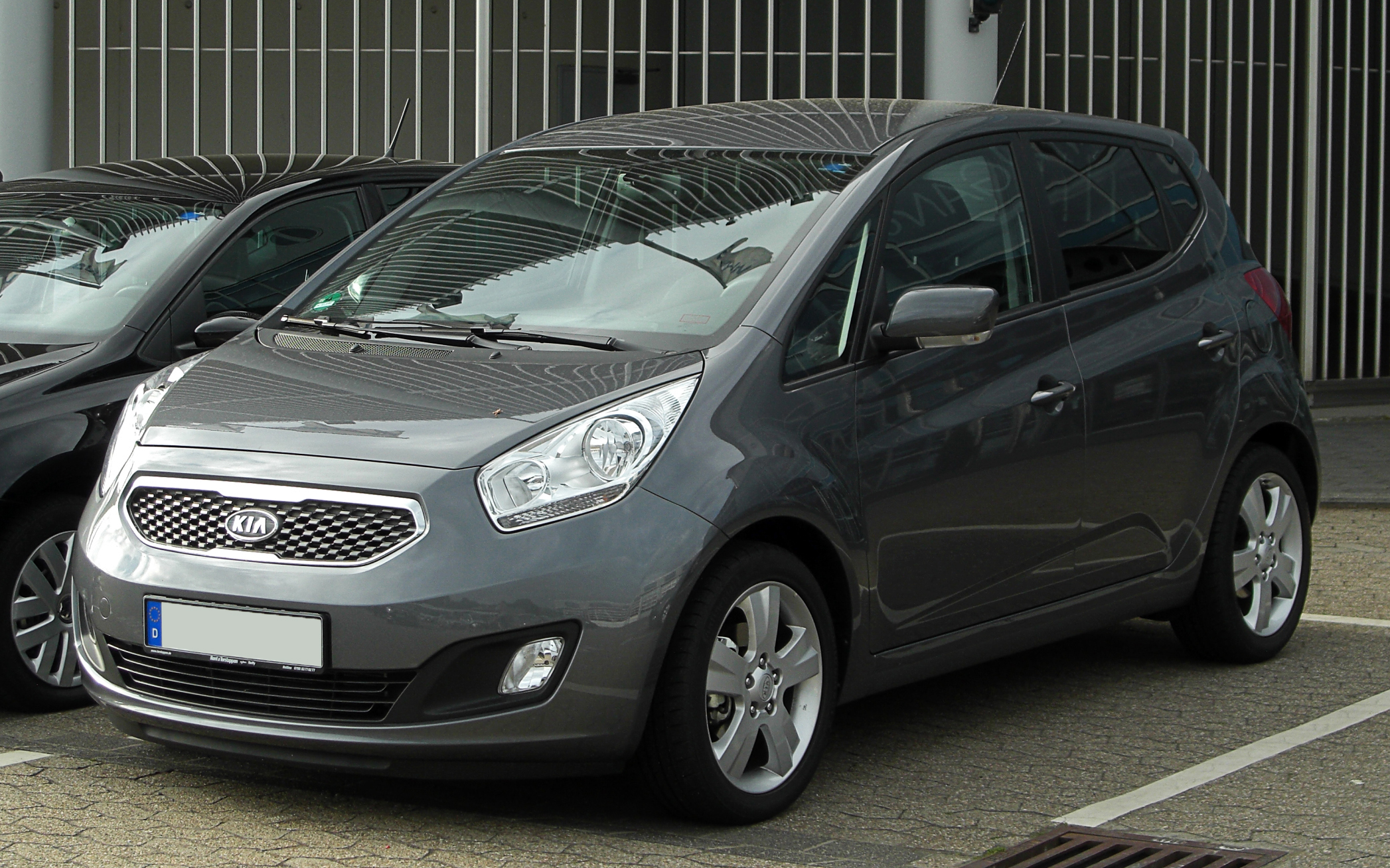 Kia Venga